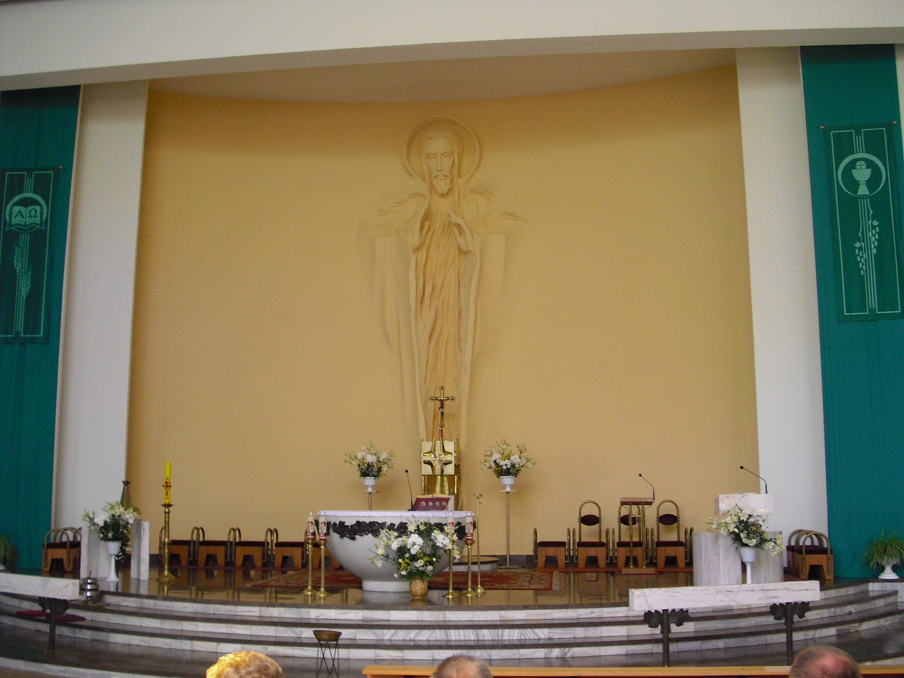 Kościół Parafii Najświętszego Serca Pana Jezusa i św. Jana Bosko w Piotrowicach, główny ołtarz